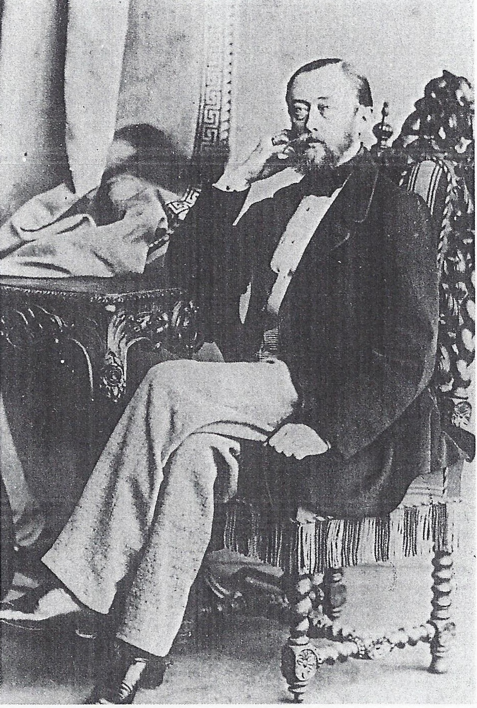 Fotografie von Karl von Saucken (1823-1871)